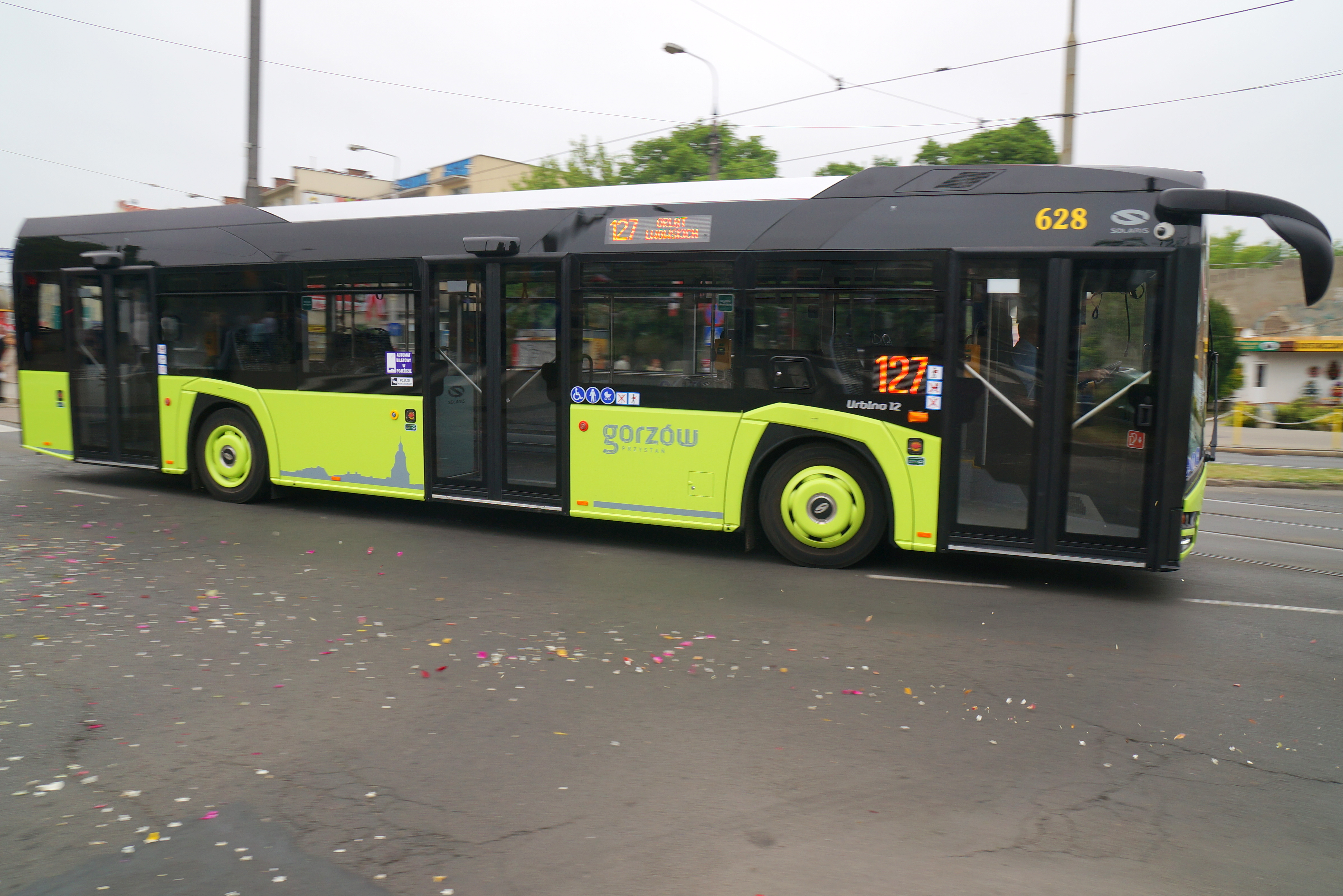 Gorzów Wlkp., ul. Wybickiego. Autobus komunikacji miejskiej Solaris Urbino 12 czwartej generacji (#628)